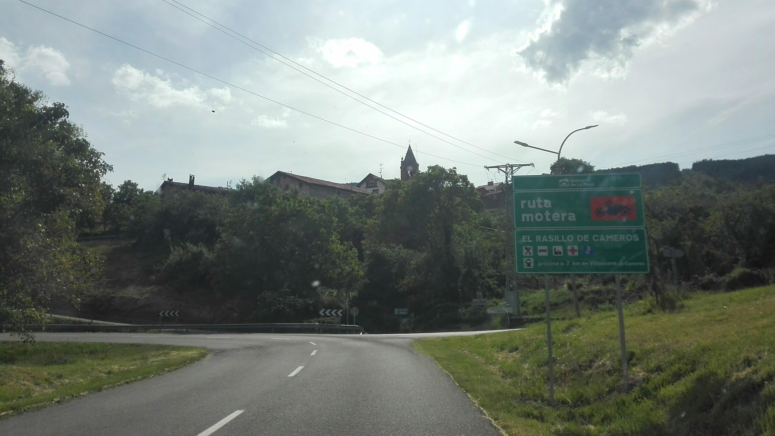 Rasillo de Cameros entrada